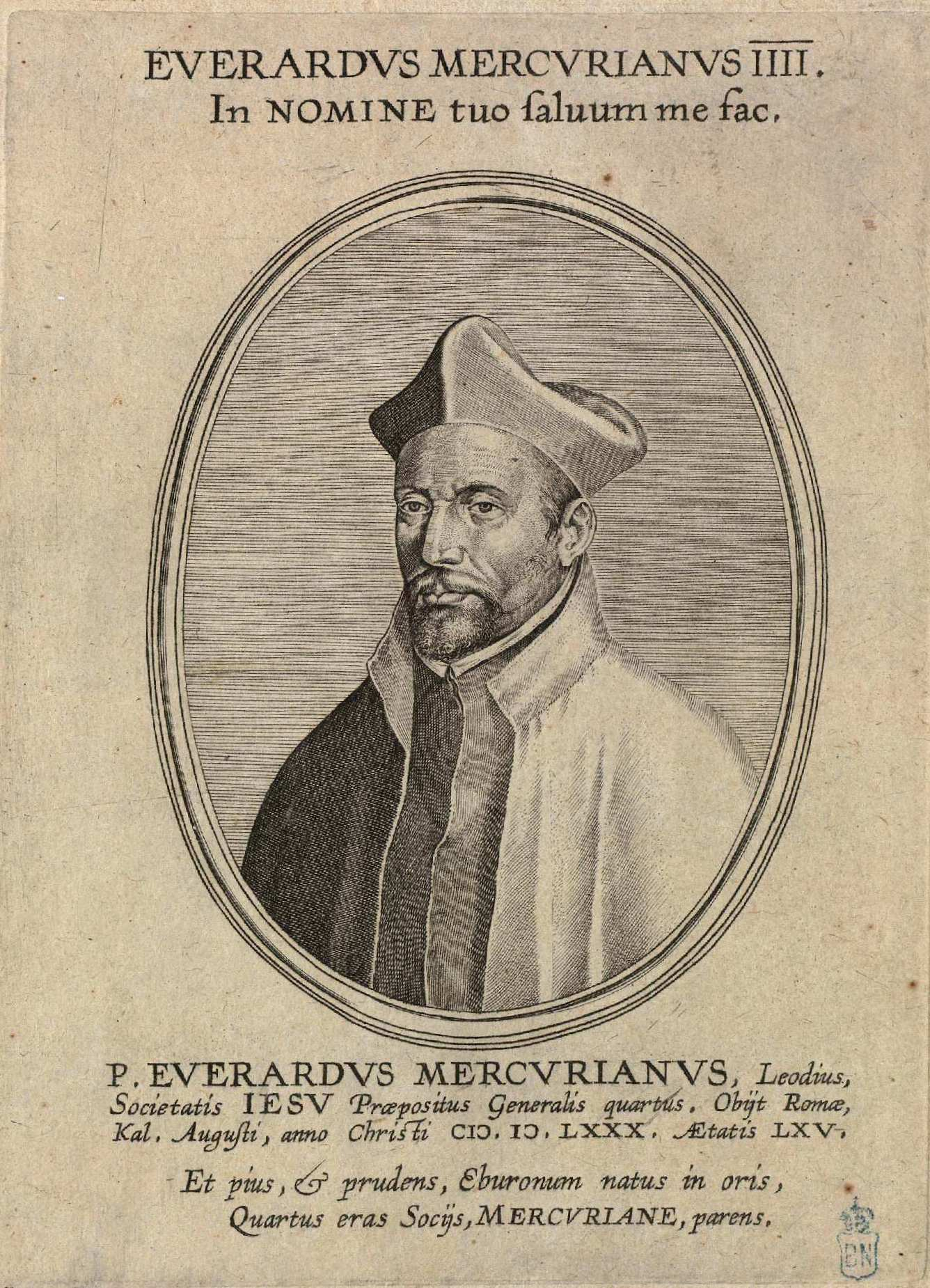 Everardo Mercuriano, aguafuerte y buril. Ilustración de Societatis Iesu Praepositorum Generalium imagines, firmada en portada por Philippe Galle como dibujante y grabador. Biblioteca Nacional de España.